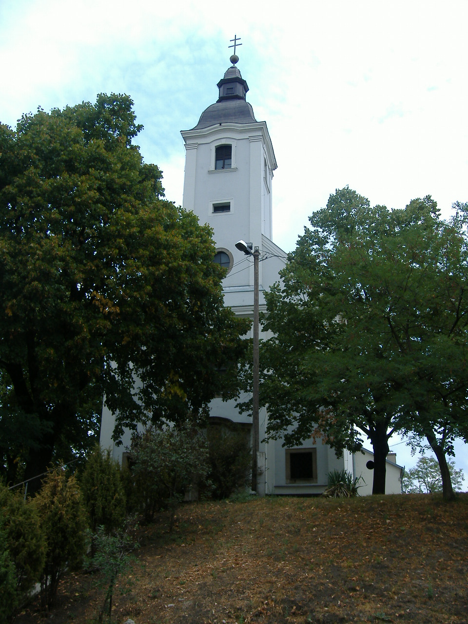 Tiszaalpár, Jótanács Anyja alpári várdomb templom